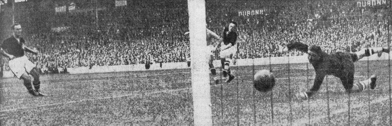 Finale de la Coupe du monde de football 1938 à Colombes, but de Piola à la 16e minute.